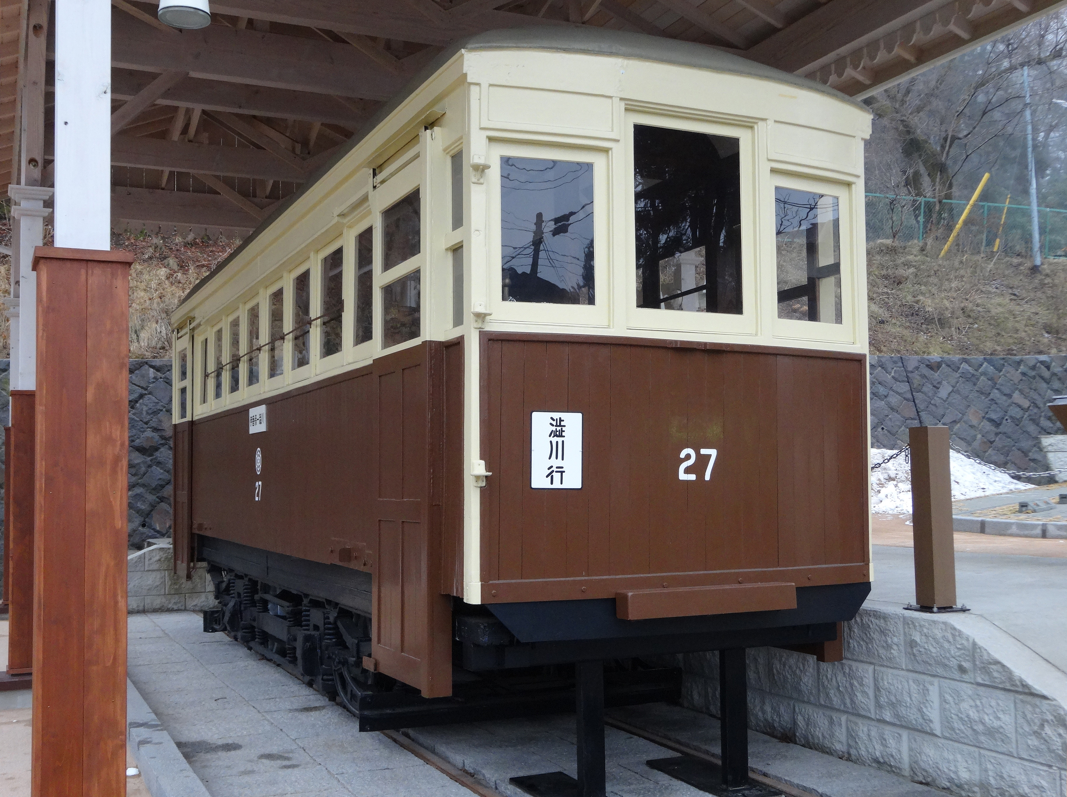 東武伊香保軌道線で使われていたデハ27電車